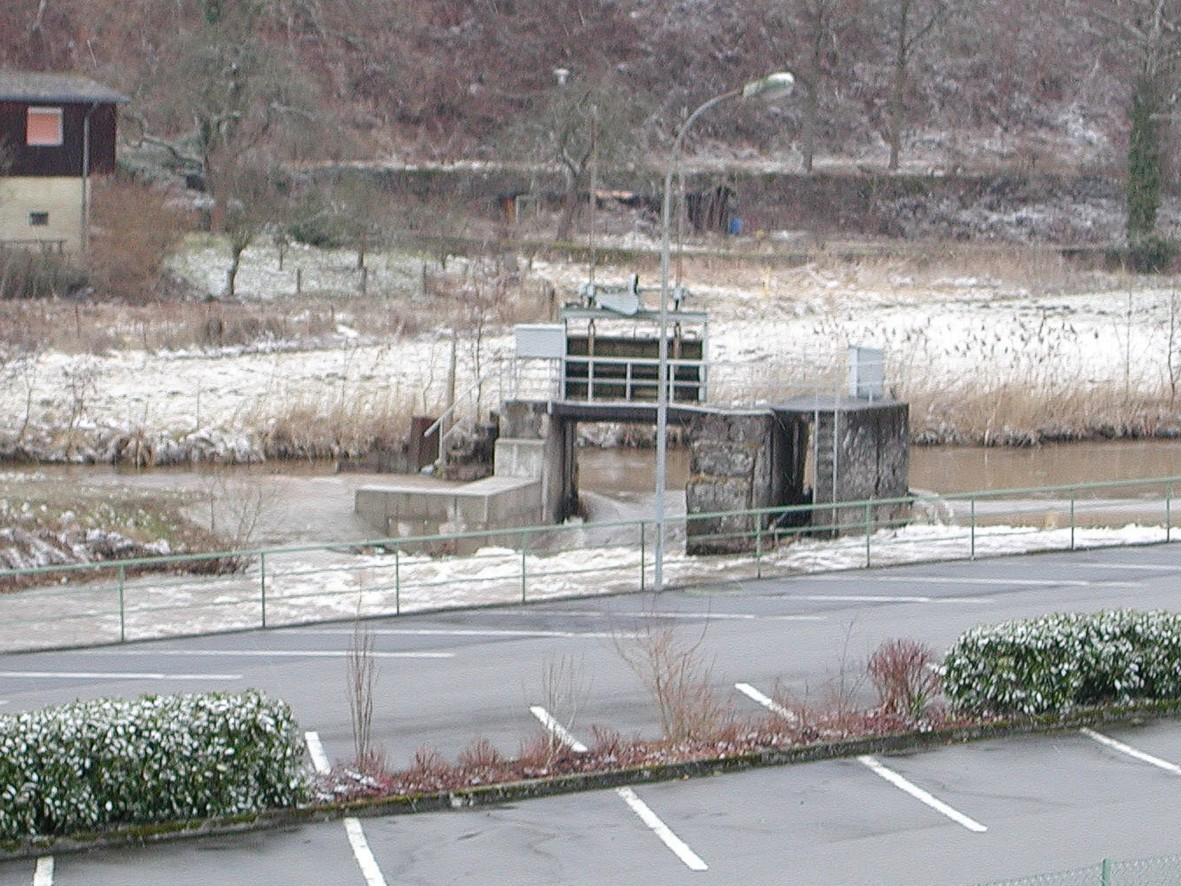 Einmündung des Landgraf-Carl-Kanals in die Diemel bei Karlshafen Quelle: selbst fotografiert Fotograf/Zeichner: presse03 Datum: 12.03.2006